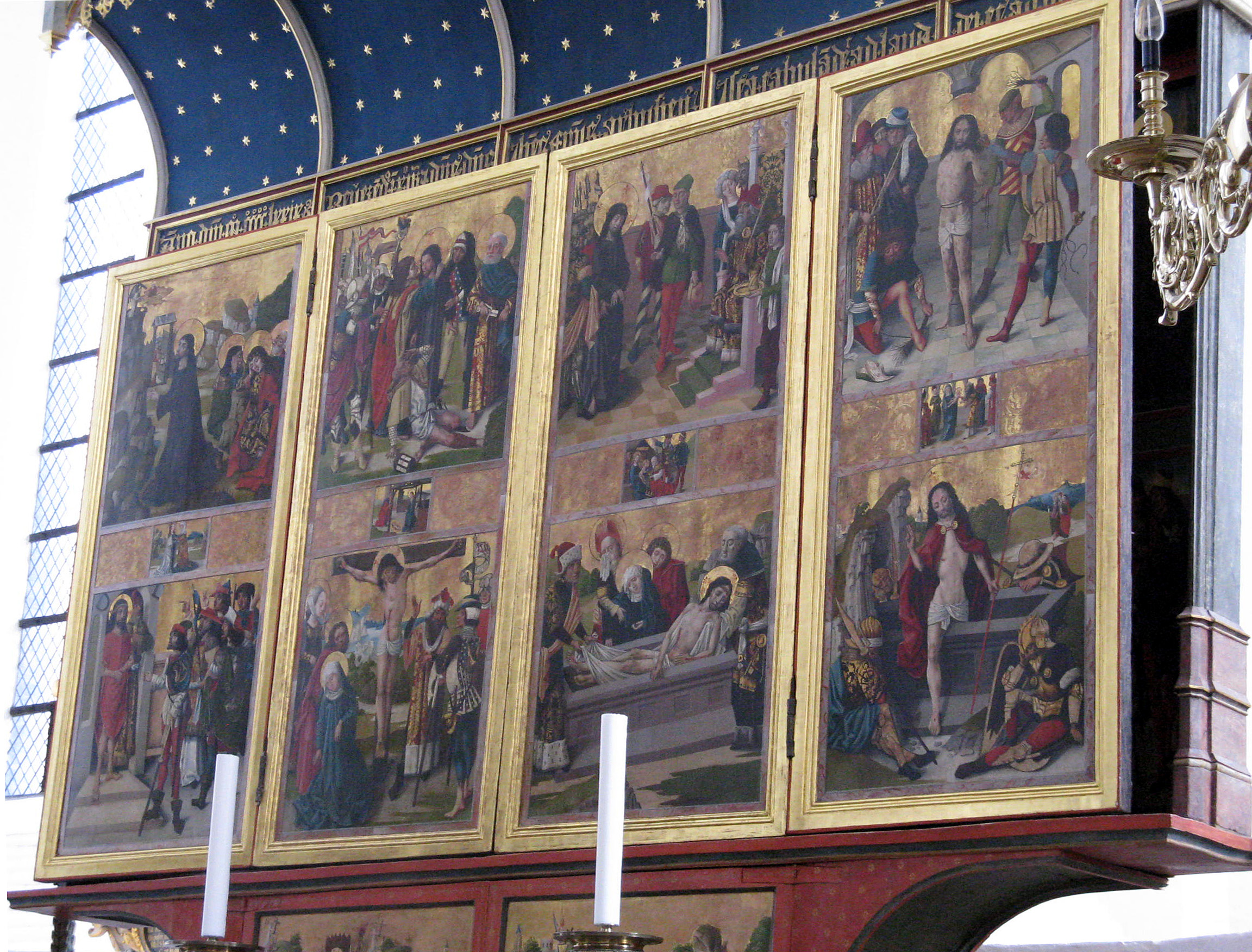 Fastesiden af Bernt Notkes altertavle i Århus Domkirke